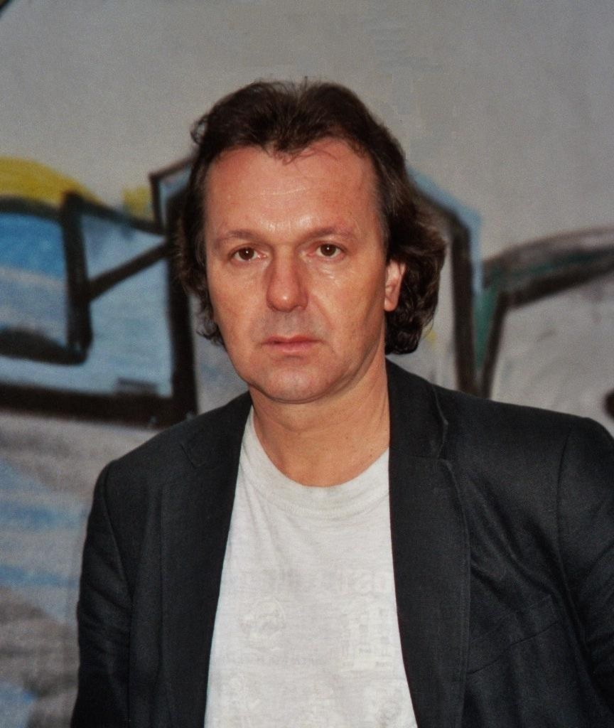 Rudolf Volz (2005)